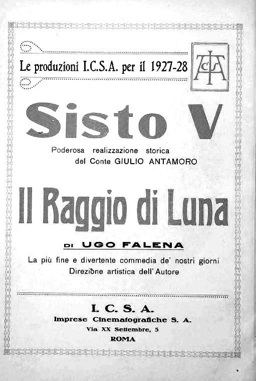 Flano promozionale della I.C.S.A. Industrie cinematografiche società anonima (Roma-Firenze) pubblicato sulla Rivista cinematografican, 10 ottobre 1927. L'inserzione pubblicizza due film mai realizzati